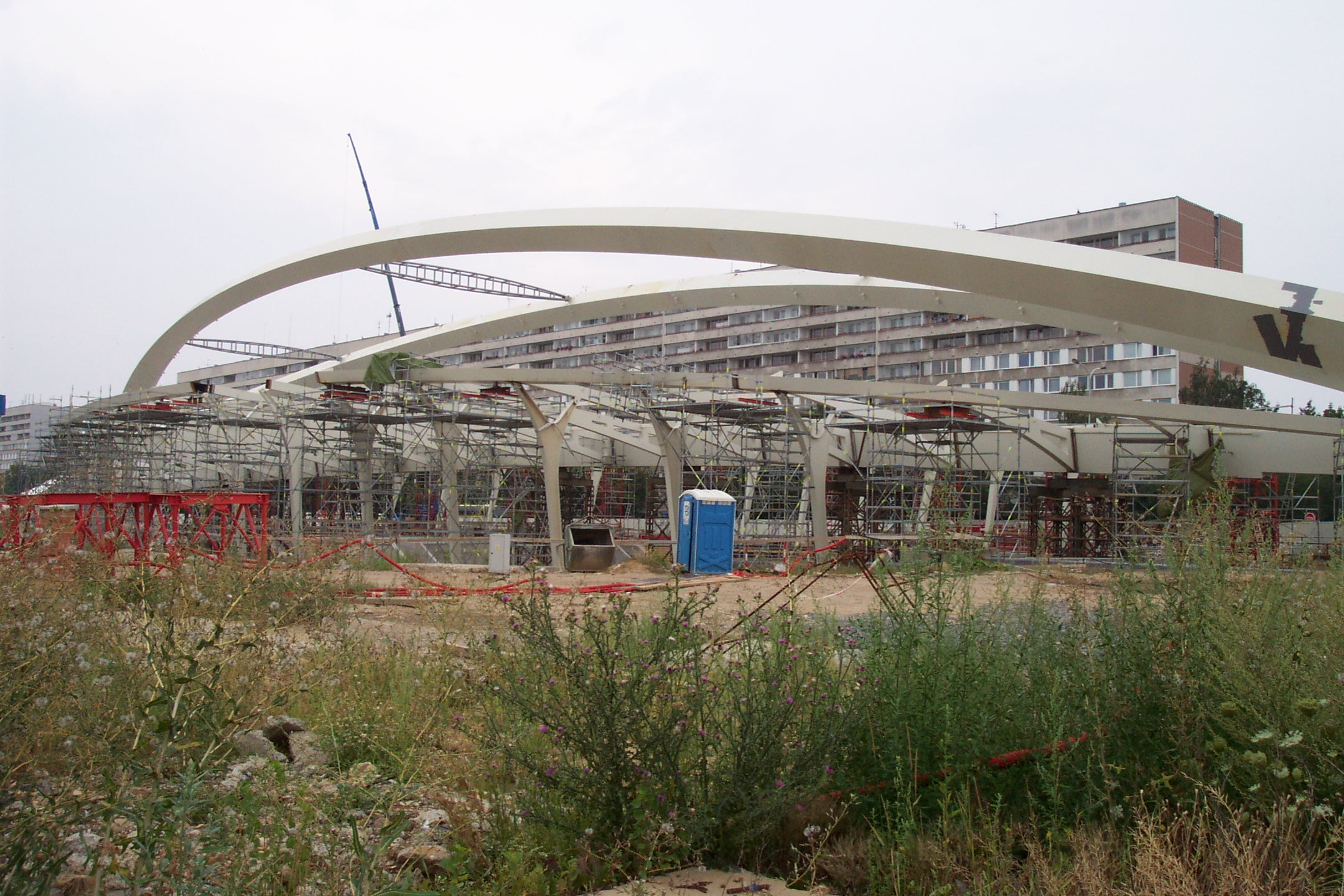 Metro station Střížkov in Prague in construction - Stanice metra Střížkov v Praze, ve stavbě